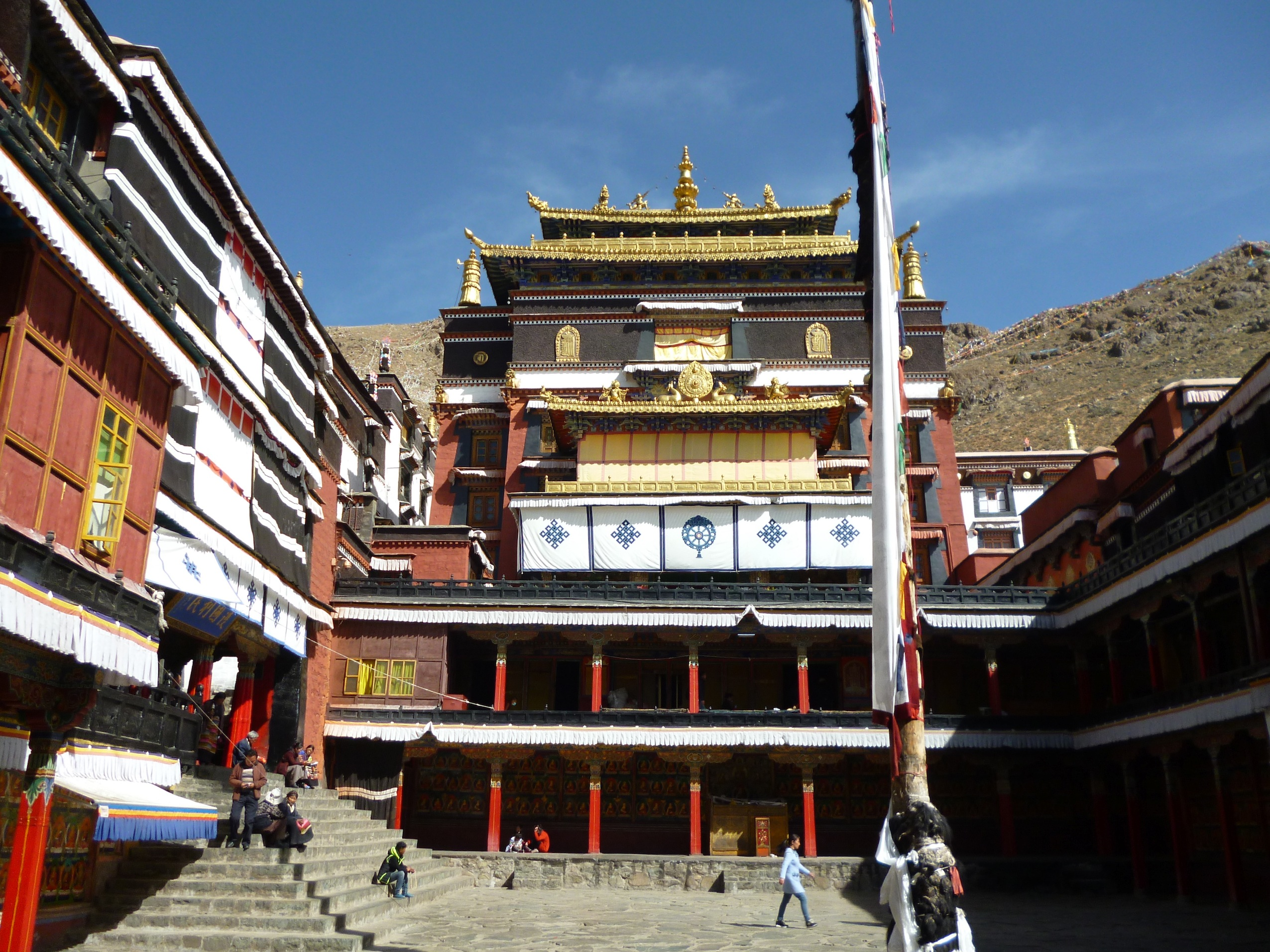 Zentraler Tempel und Sitz des Panchen Lama von Trashihünpo